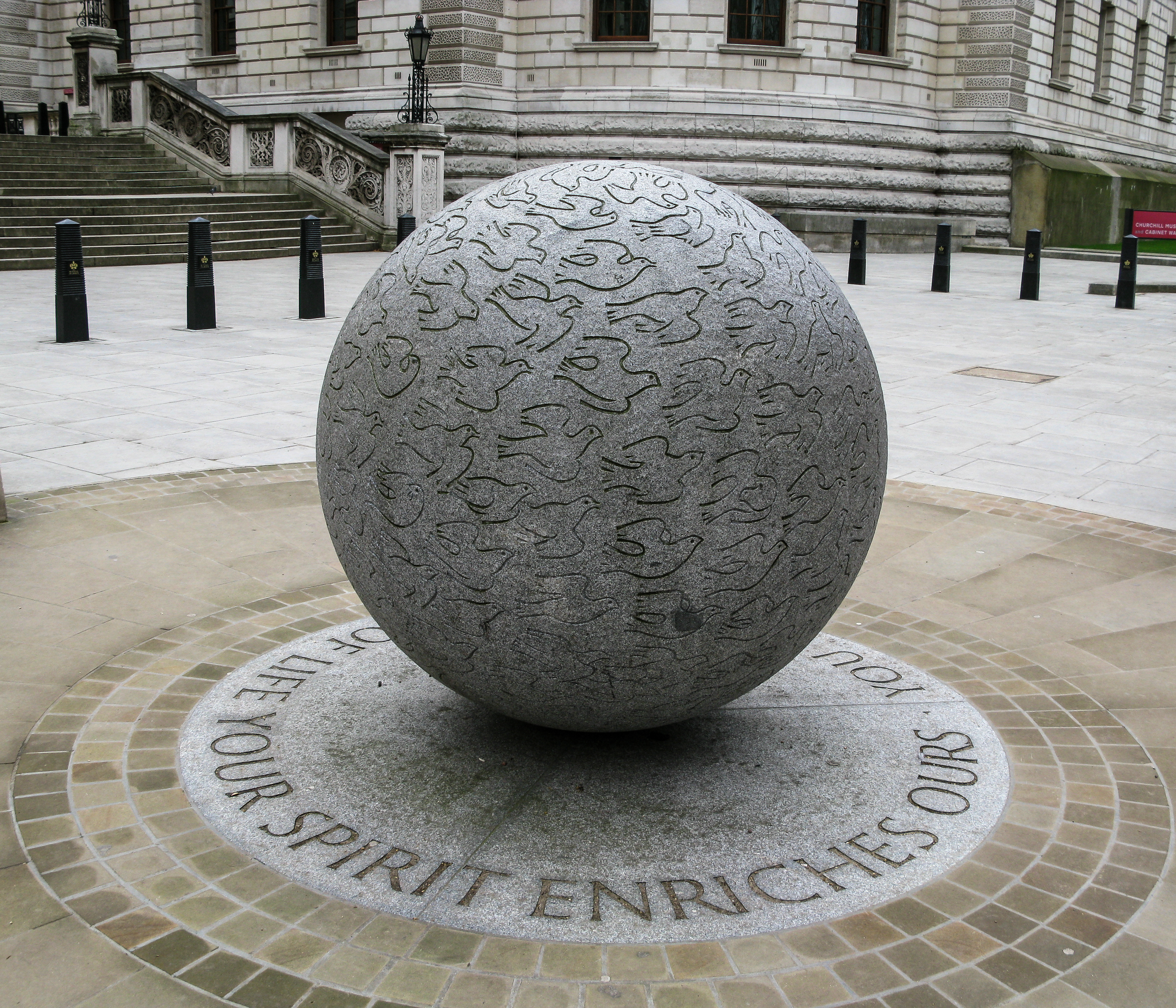 London, War memorial Sculpture TitleBali Bombings MemorialArtistGary BreezeDate12 October 2006